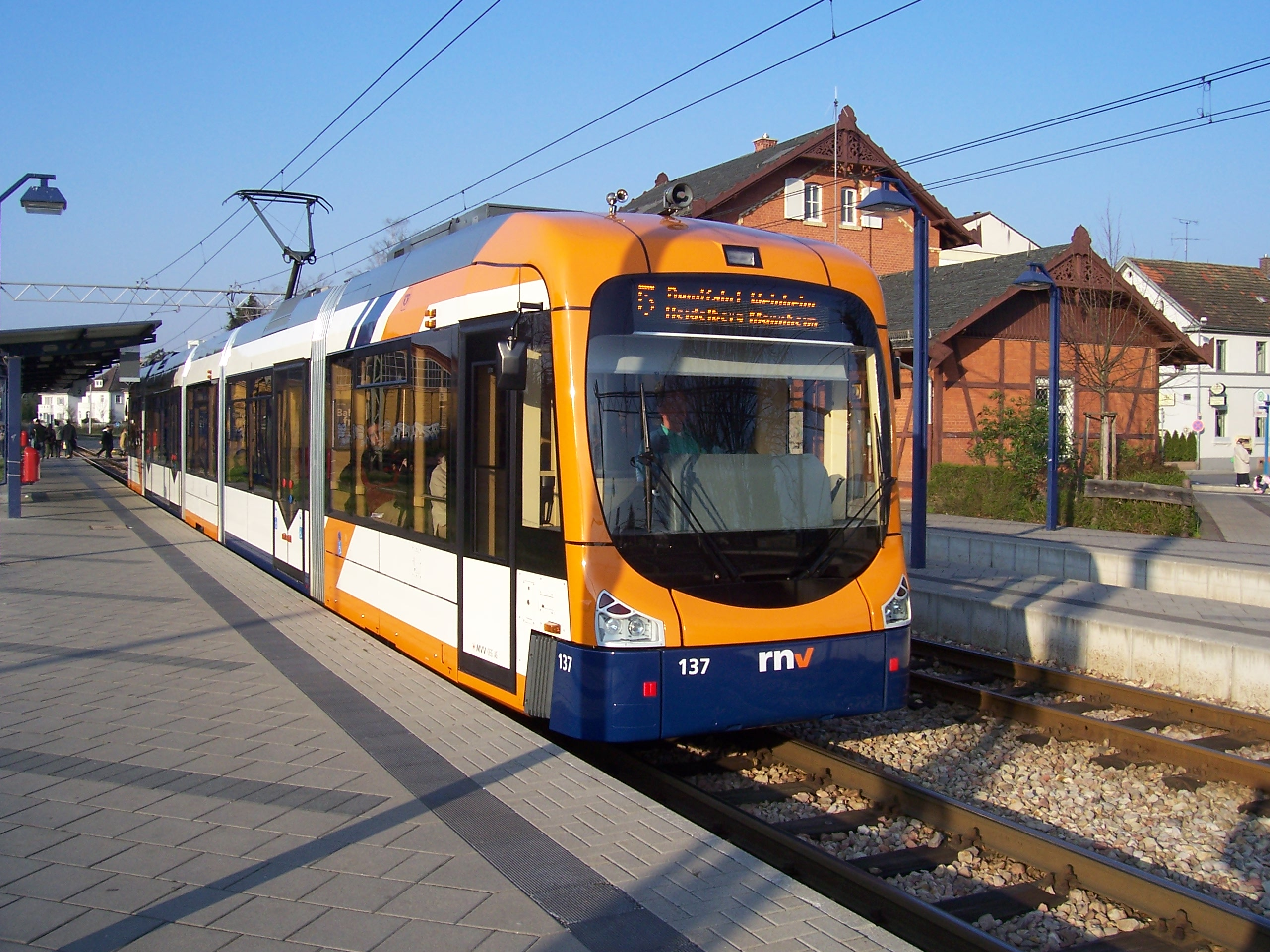 Variobahn 135 der MVV OEG AG in Viernheim